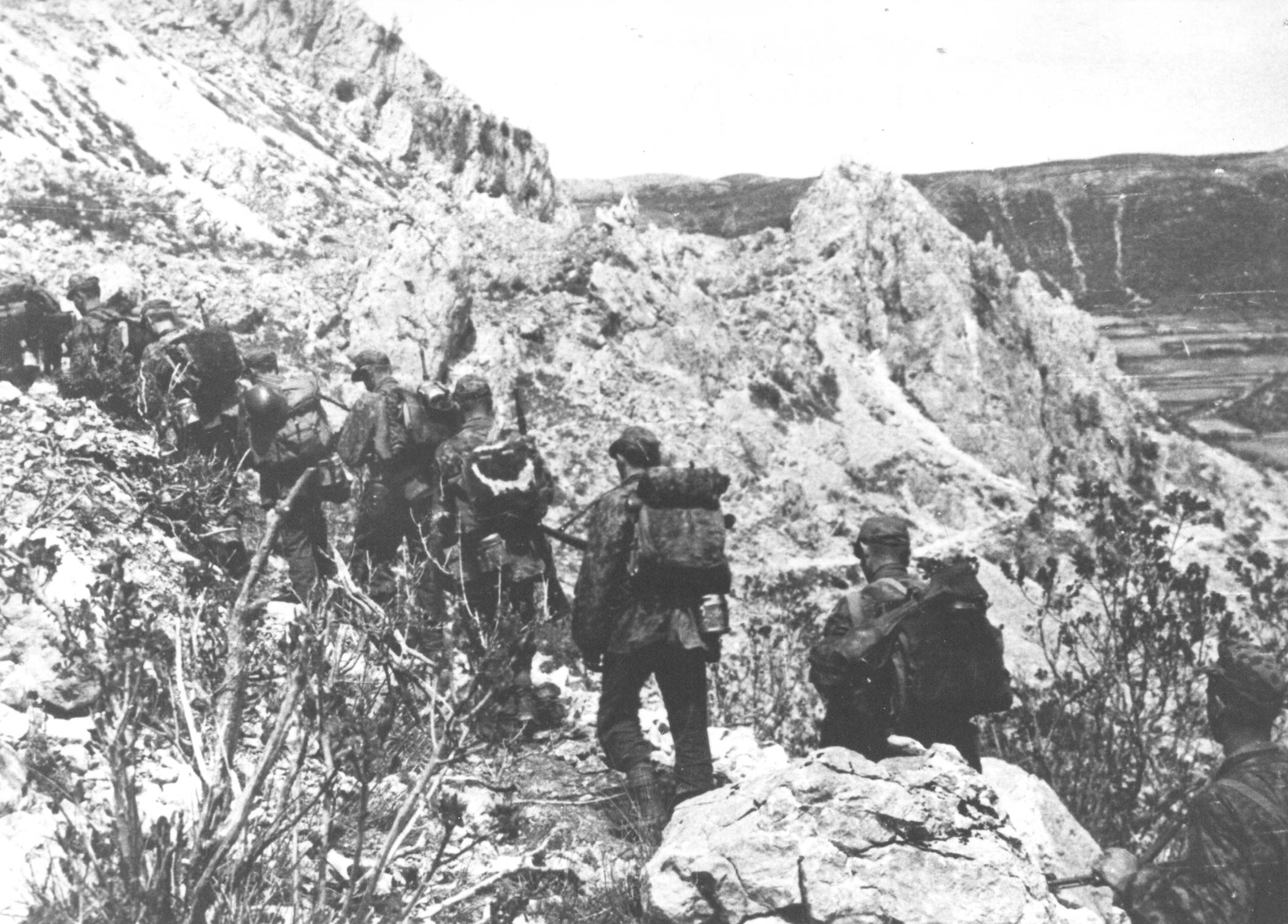 Srpskohrvatski / српскохрватски: Pripadnici 105 SS odreda, obučeni za planinsko ratovanje, nastupaju od Grahova ka Drvaru 25. maja 1944.